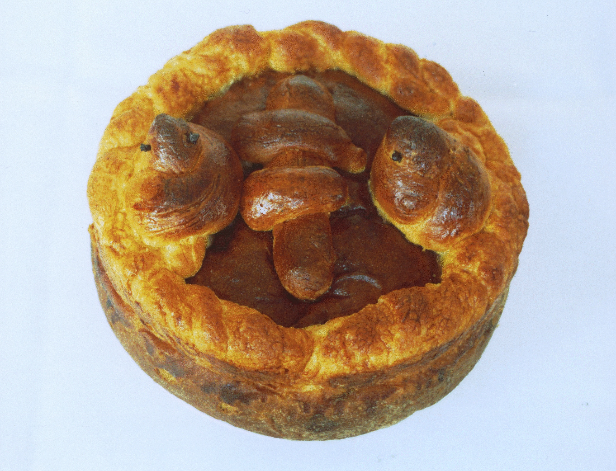 Паска із Закарпаття. Photo taken by Jozafát Vladimír Timkovič, OSBM